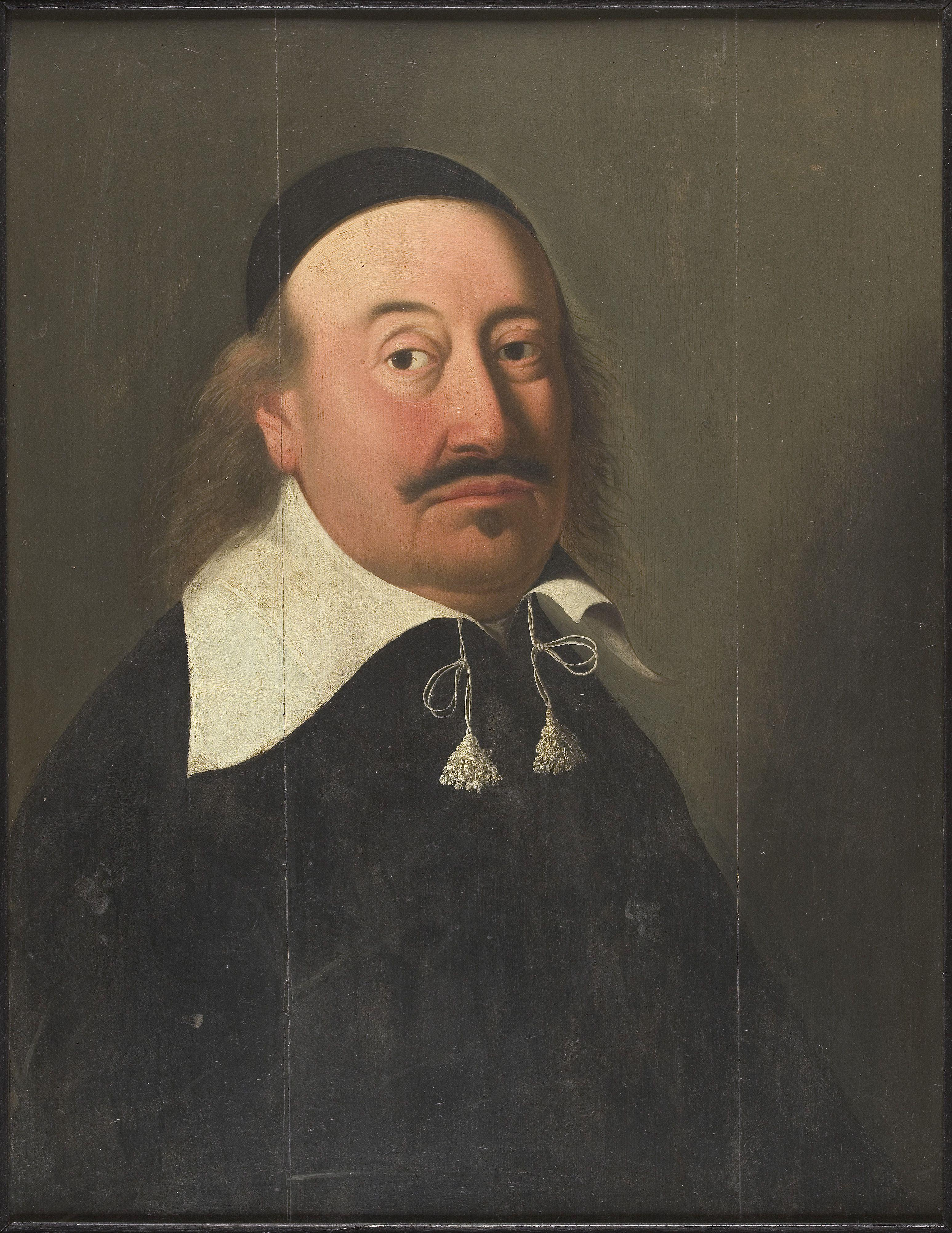 Professor Petrus Moll 1647-1669 olieverf op paneel